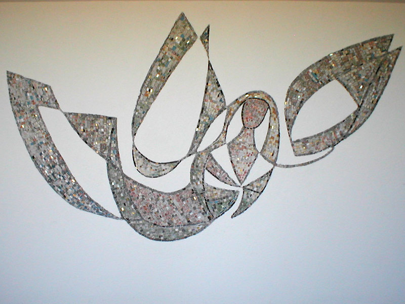 Wandmosaik an der Johanneskirche in Billensbach von Paul Heinrich Ebell